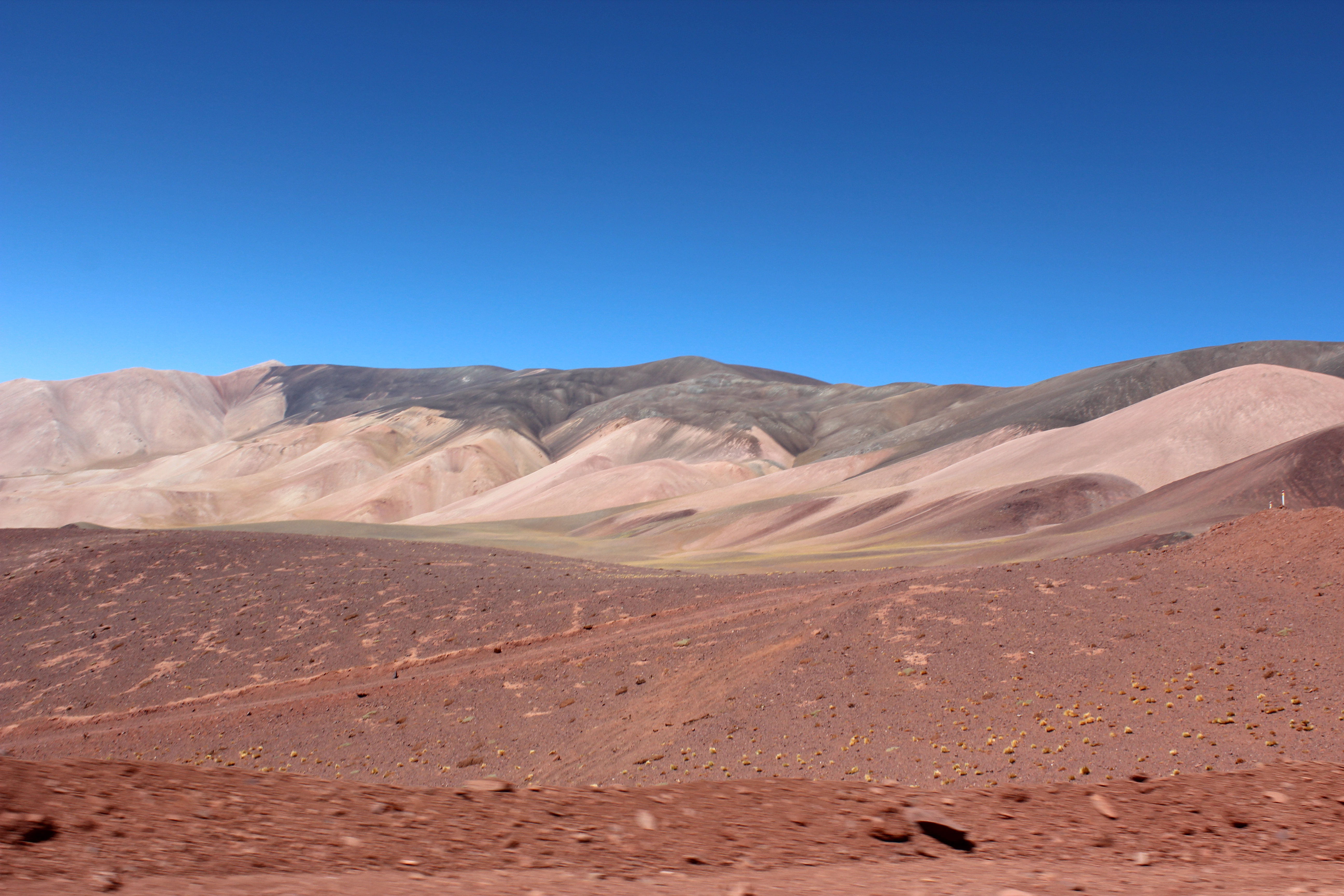 Se puede observar una vista periferica de La Cordillera de Los Andes del lado Argentino por el paso Pircas Negras.